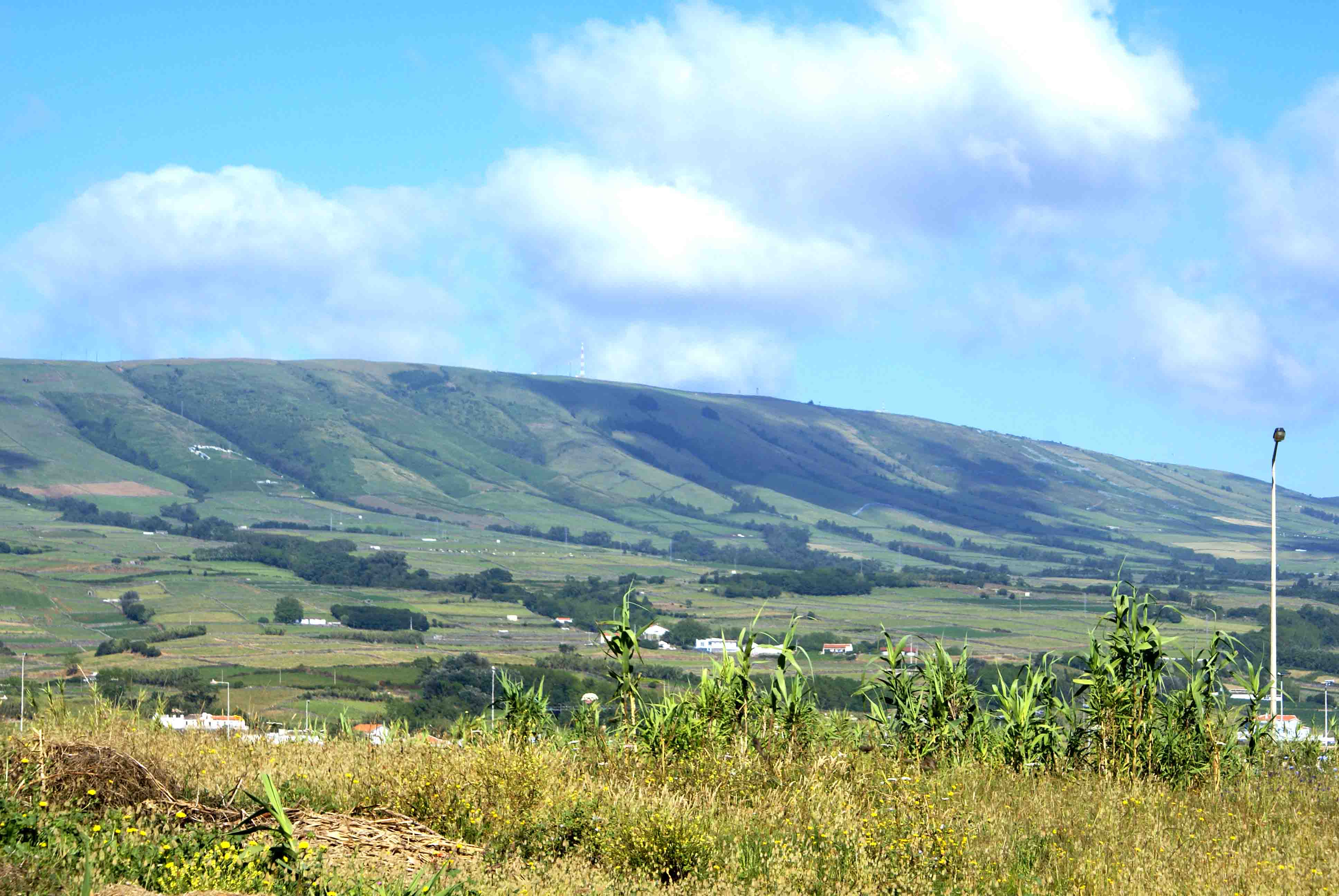 Serra do Cume, Praia da Vitória, ilha Terceira, Açores, Portugal.